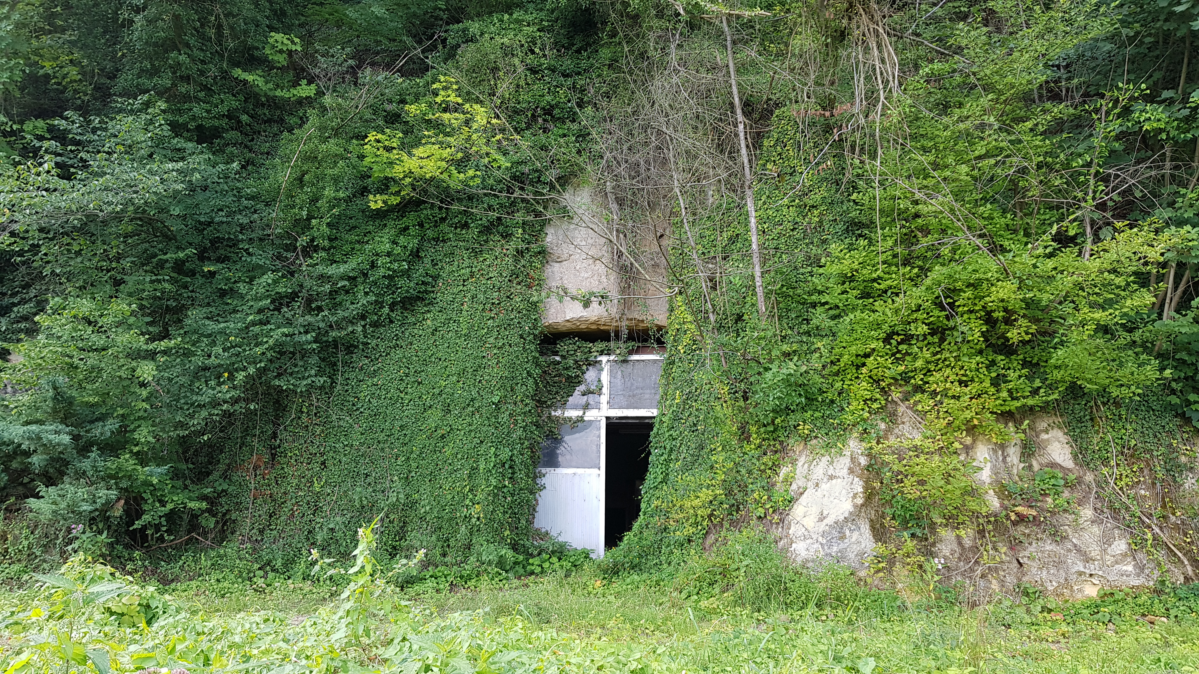 Groeve Onder de Ravengroeve, Geulhem, Nederland